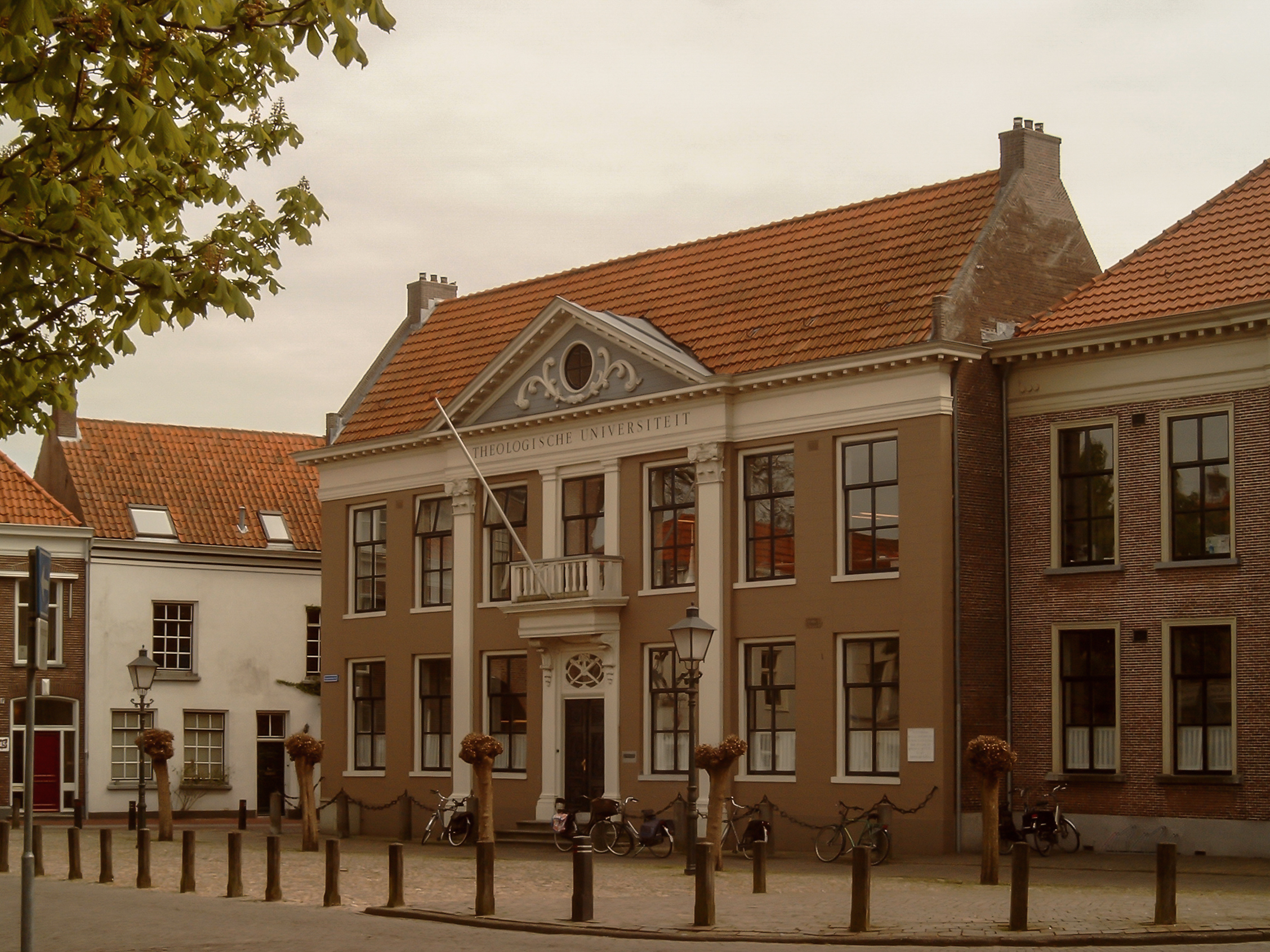 Kampen, Theologische Universiteit